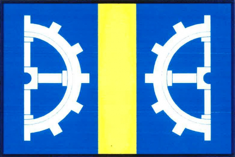 vlajka, Sedlice, okres Příbram